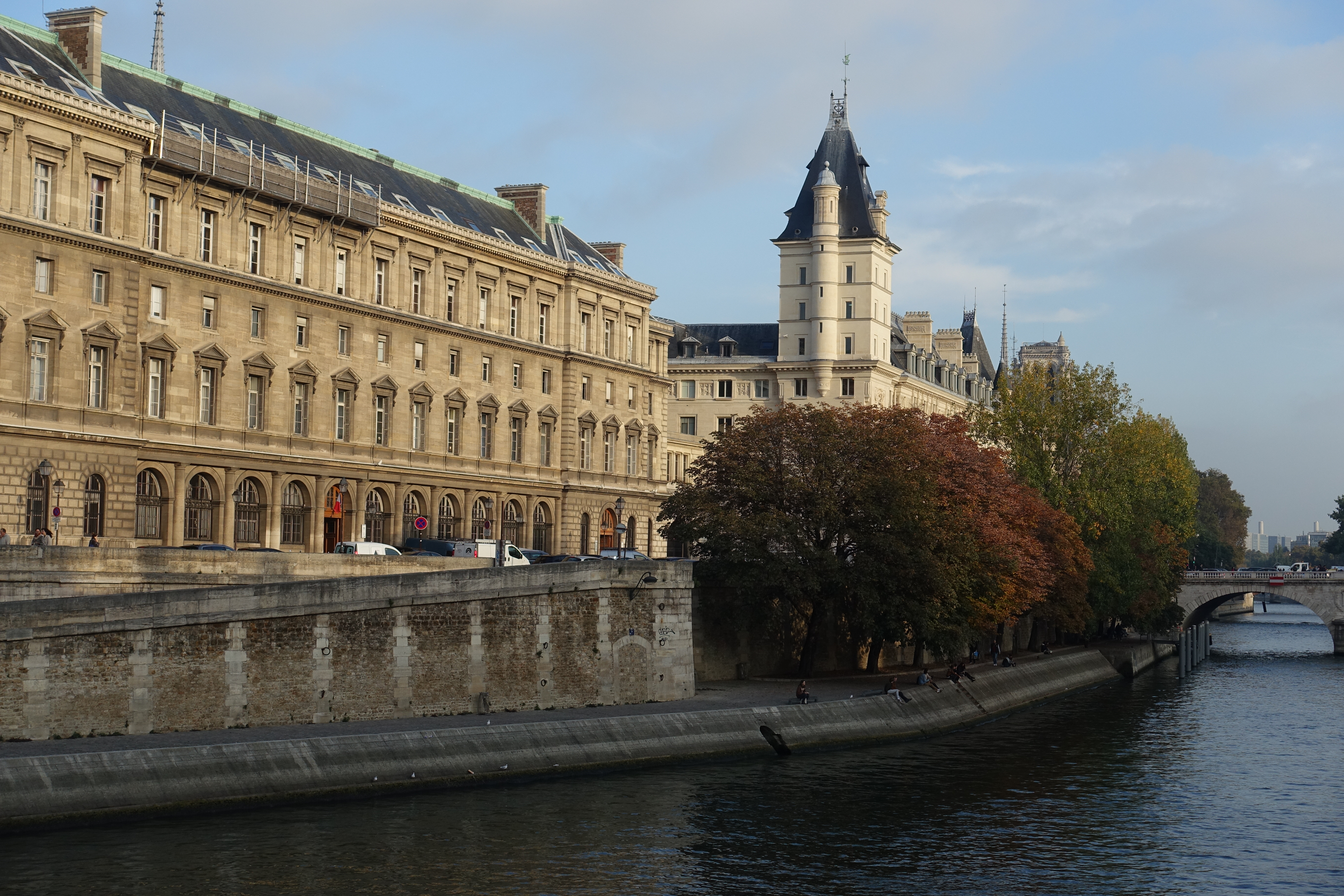 Ile de la Cité @ Seine @ Paris